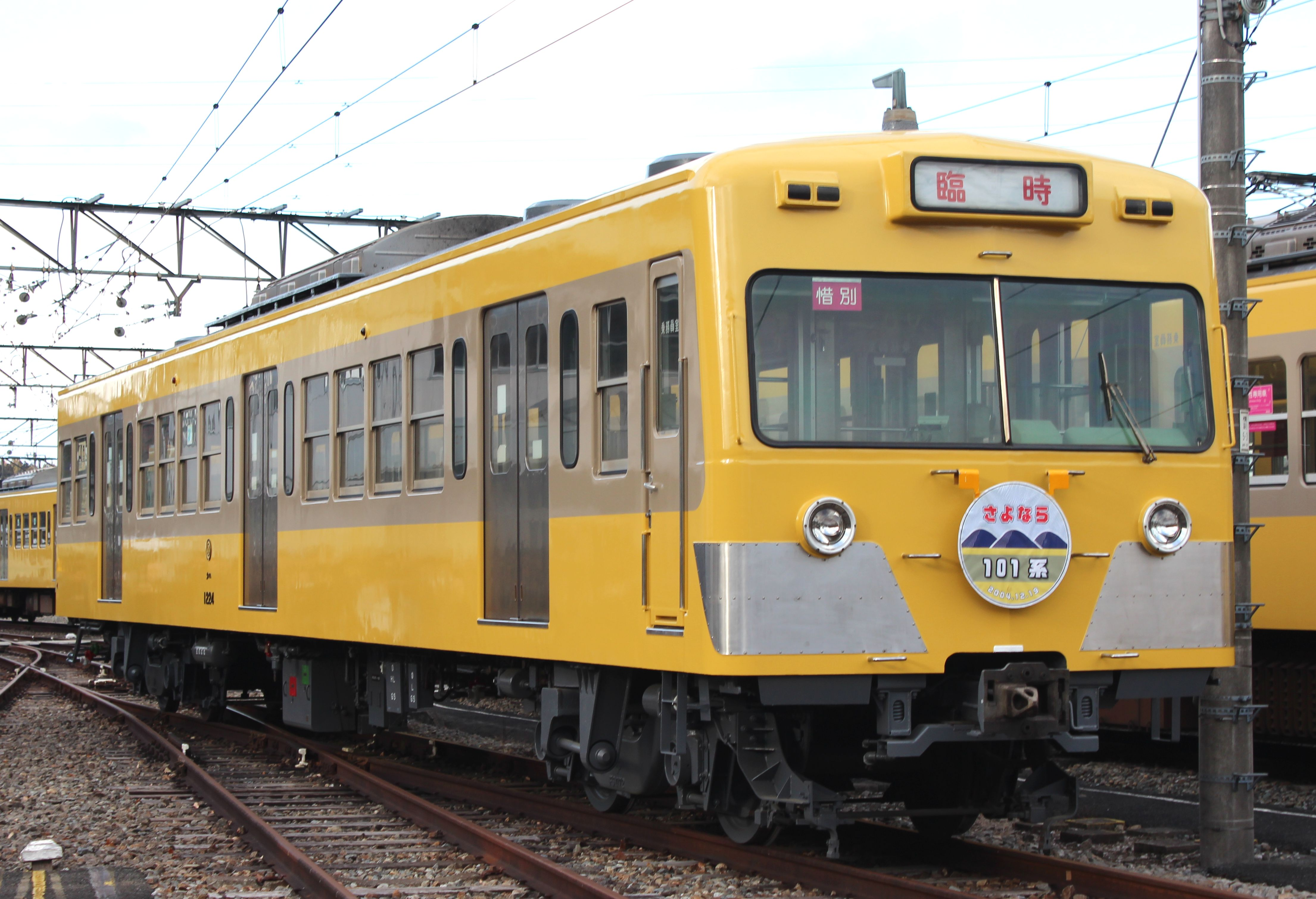 西武 101系電車